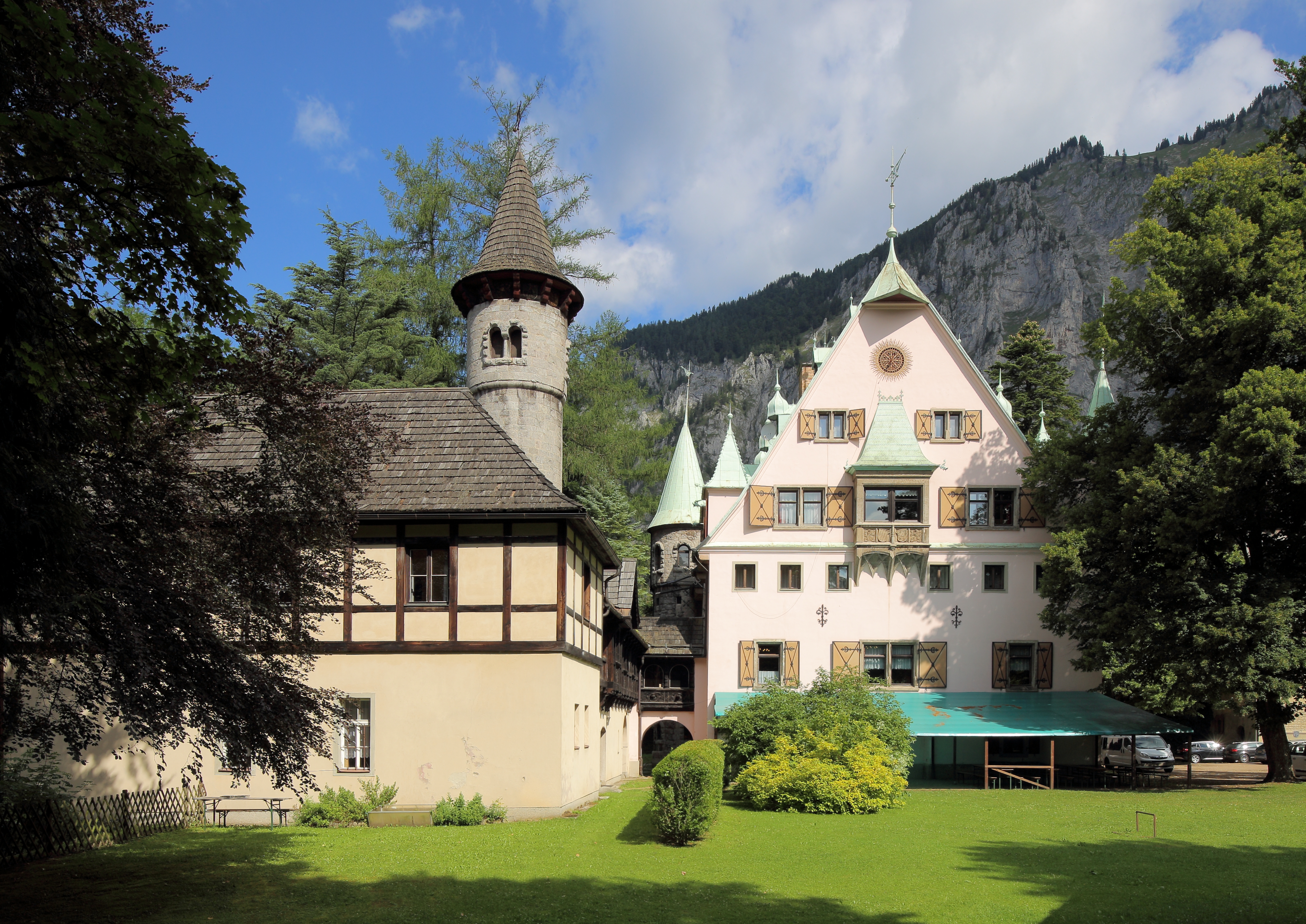 Südostansicht des Schlosses Leopoldstein in Münichtal, ein Ortsteil der österreichischen Stadt Eisenerz im steirischen Bezirk Leoben.Zwischen 1666 und 1670 ließ Kammergraf Leopold Freiherr von Neidthardt zu Spathenbrunn das sogenannten „Saurießlgut“ zu einem Schloß ausbauen und gab zu Ehren Kaiser Leopold ihm den Namen „Schloss Leopoldstein“. Nachdem um 1880 das Anwesen in den Besitz von Prinz Arnulf von Bayern gelangte, ließ dieser nach dem Vorbild der bayrischen Königsschlösser es zwischen 1890 und 1895 im historisierenden Stil umbauen. Aktuell (2015) wird es als Jugendsporthaus des Landes Steiermark genutzt.